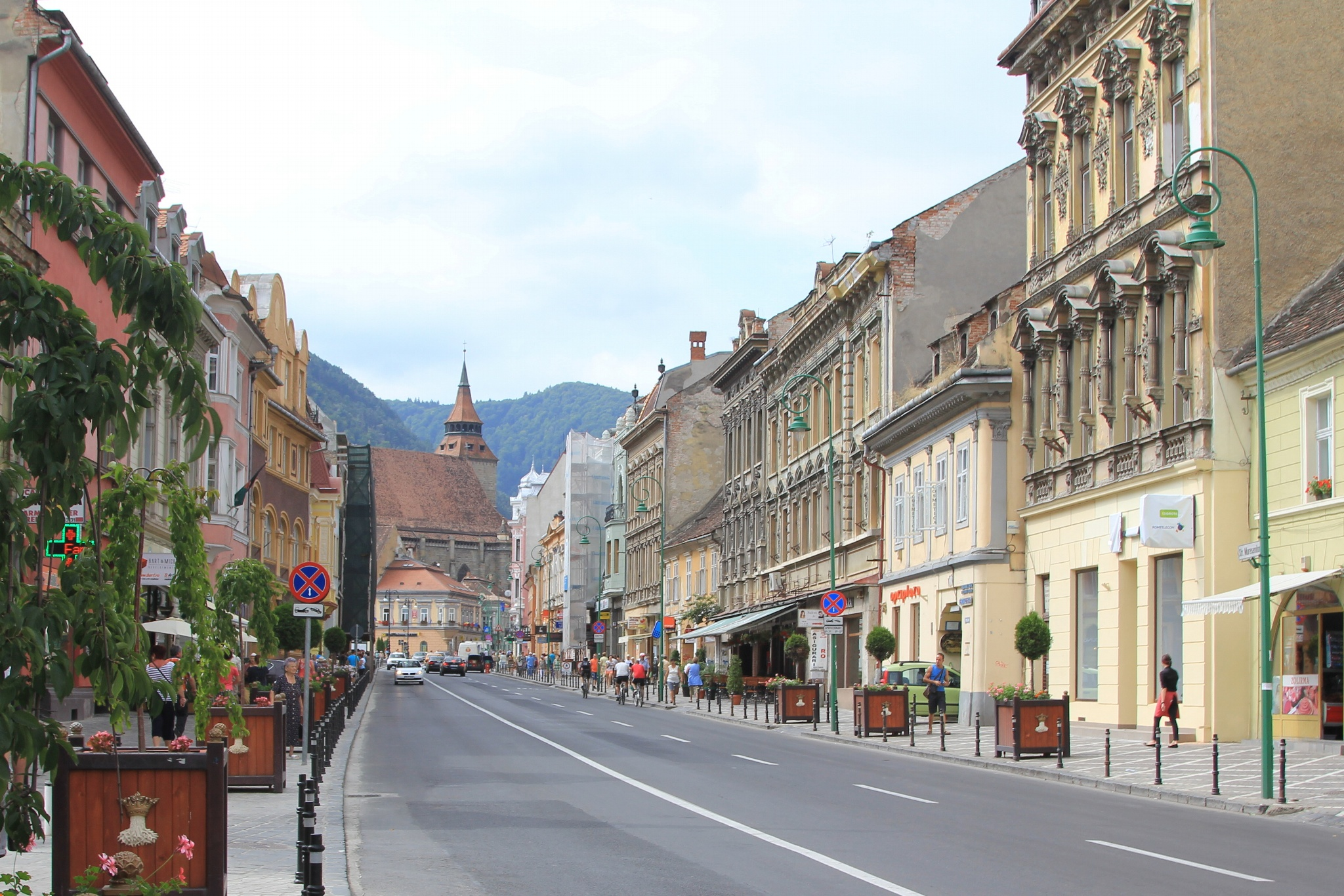 Брашов